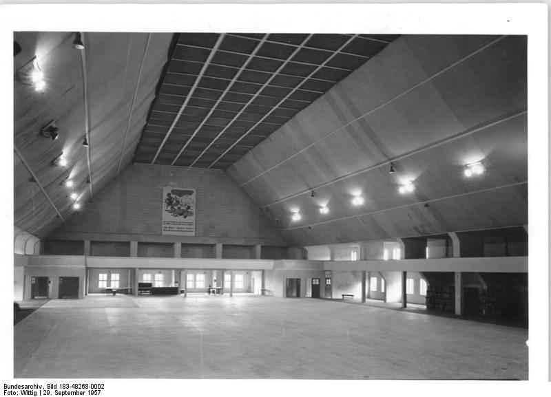 Erfurt, Thüringenhalle, Innenansicht Zentralbild Wittig 29.9.1957 Bey-Ri. Vorbereitung zu den Hallen-Handball-Weltmeisterschaften in der DDR. Im Rahmen der vorbereitenden Arbeiten zu den Weltmeisterschaften im Hallenhandball, die im Februar 1958 in der DDR ausgetragen werden, wird zur Zeit die Thüringenhalle in Erfurt neu gestaltet. In der Thüringenhalle werden einige Vorrundenspiele der Weltmeisterschaft durchgeführt. 1 270 qm Parkettfußboden wurden vom VEB Sägewerk Weimar neu verlegt, transportable Tribünen angefertigt, sodaß ungefähr 6 500 Zuschauer den Wettkämpfen beiwohnen können. Acht Umkleideräume wurden fertiggestellt und im Augenblick werden noch zwei Duschanlagen gebaut. UBz: Von der Tribüne aus ein Blick in die Erfurter Thüringenhalle.